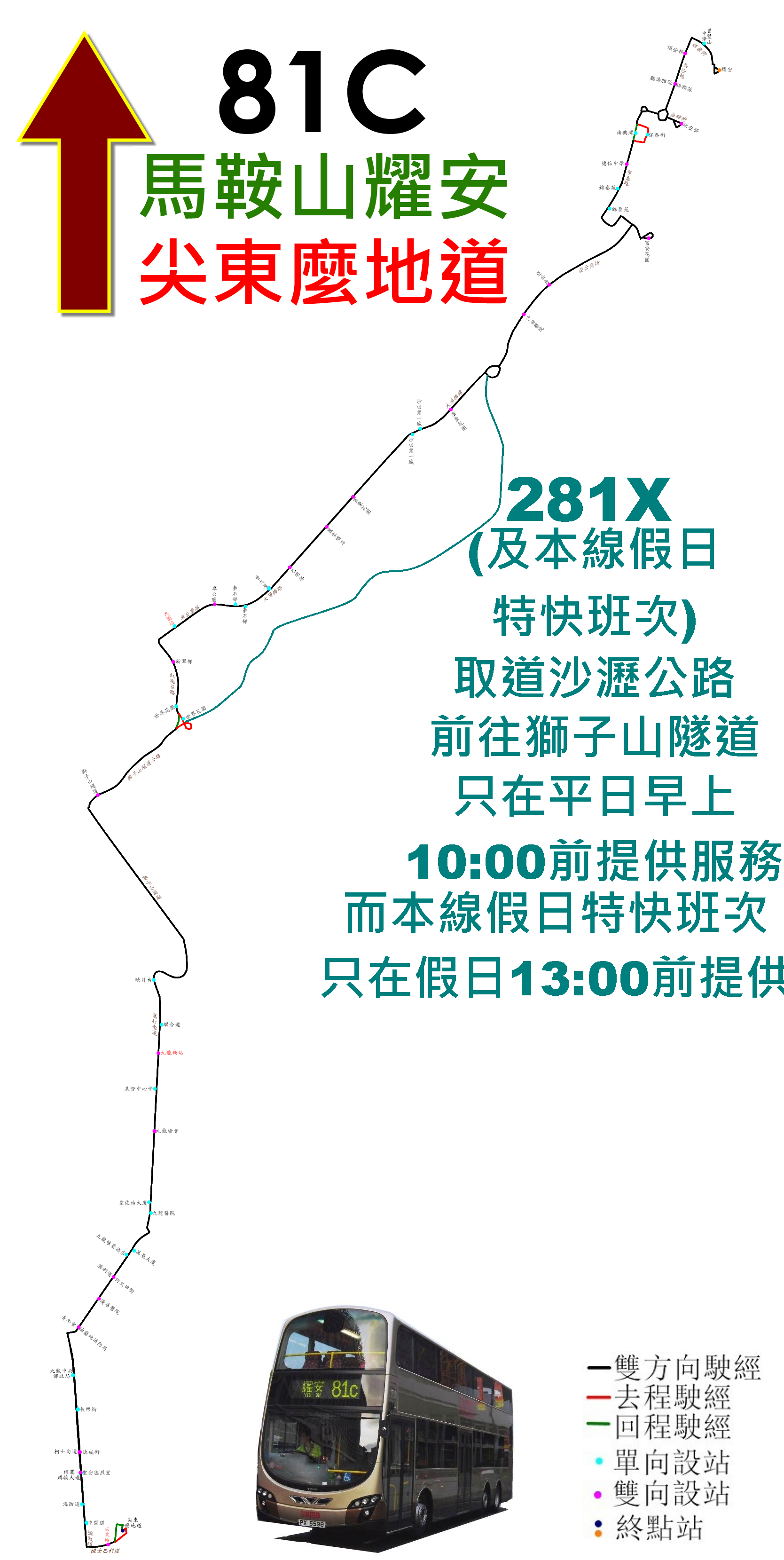 中文（香港）: 九巴81C線的走線圖